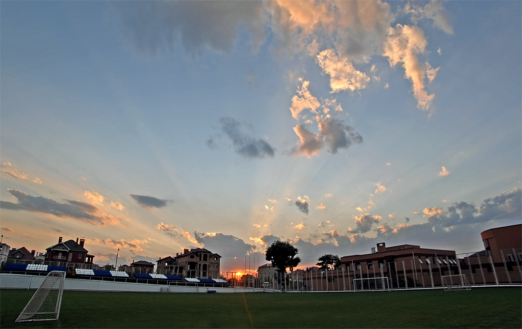 Тренировочный центр Черноморца